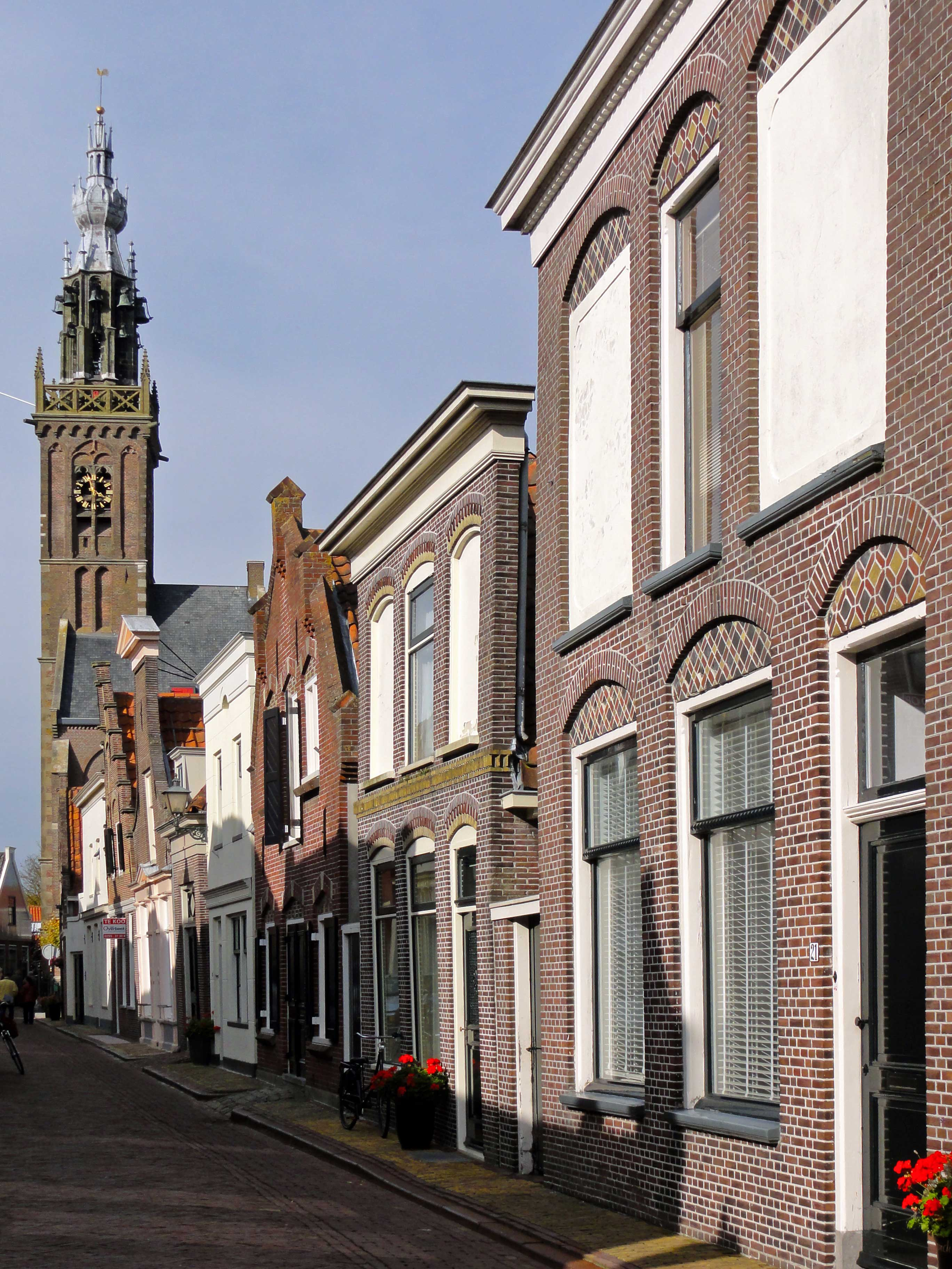 Lingerzijde met op de achtergrond de speeltoren van Edam